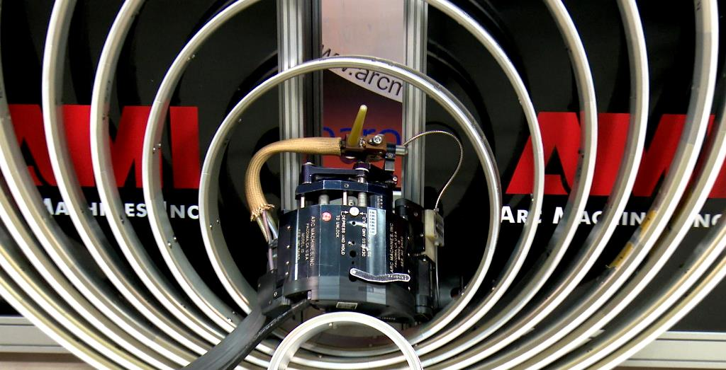 Для каждого диаметра свариваемых труб применяются соответствующие направляющие кольца.